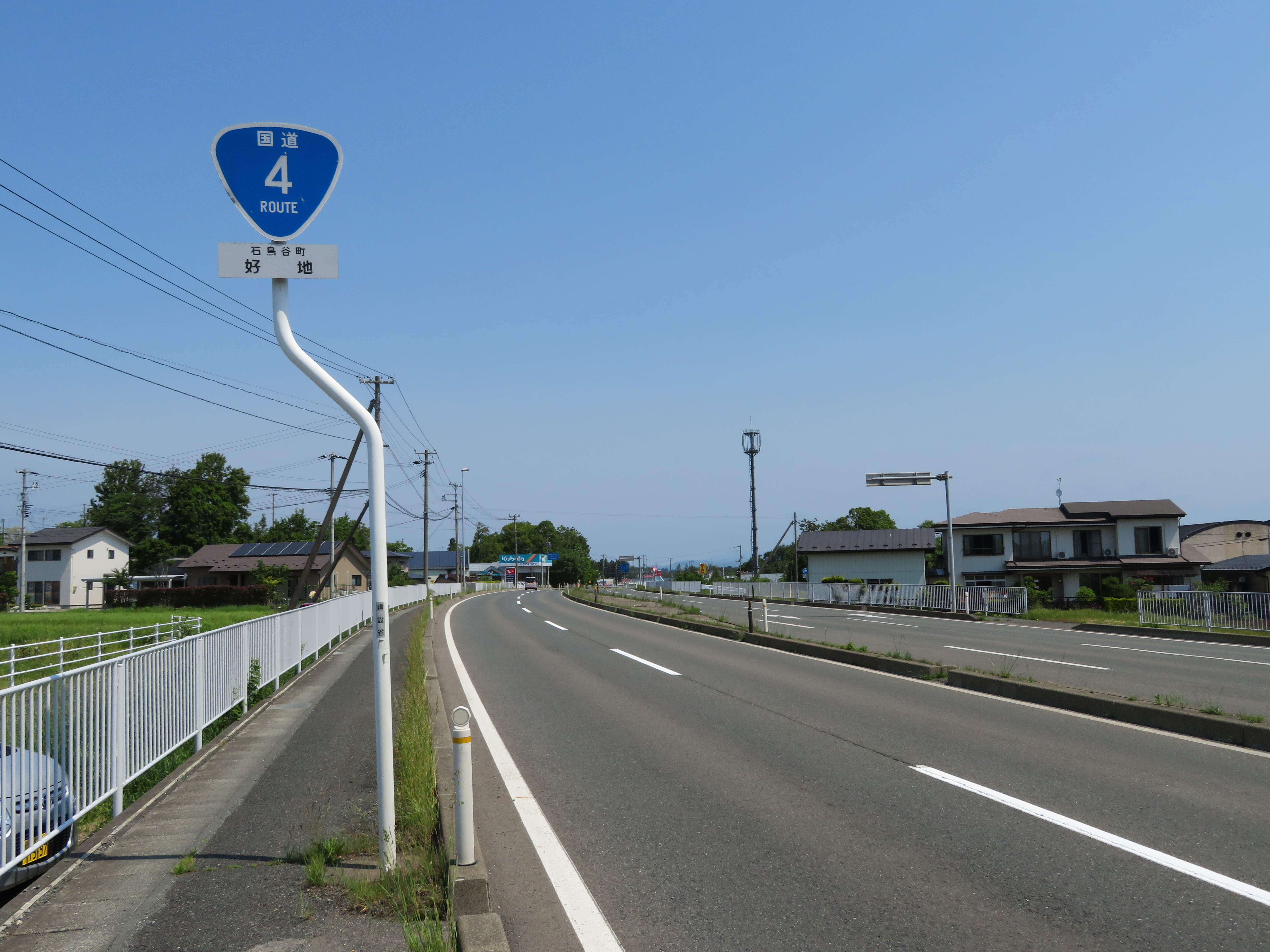 国道4号線石鳥谷バイパス花巻市好地付近（盛岡方面を撮影） Canon PowerShot SX720 HS